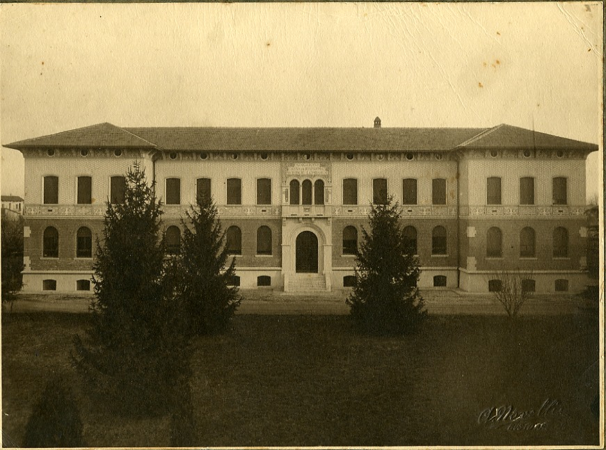 Il Padiglione Formazione dell'ospedale di Busto Arsizio (VA) in una foto degli anni 1930.